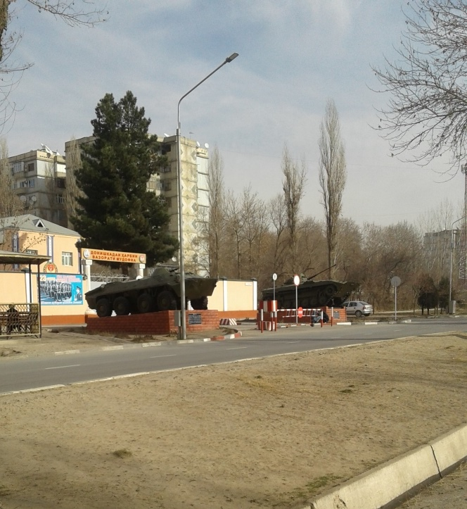 КПП, Военный институт, Душанбе